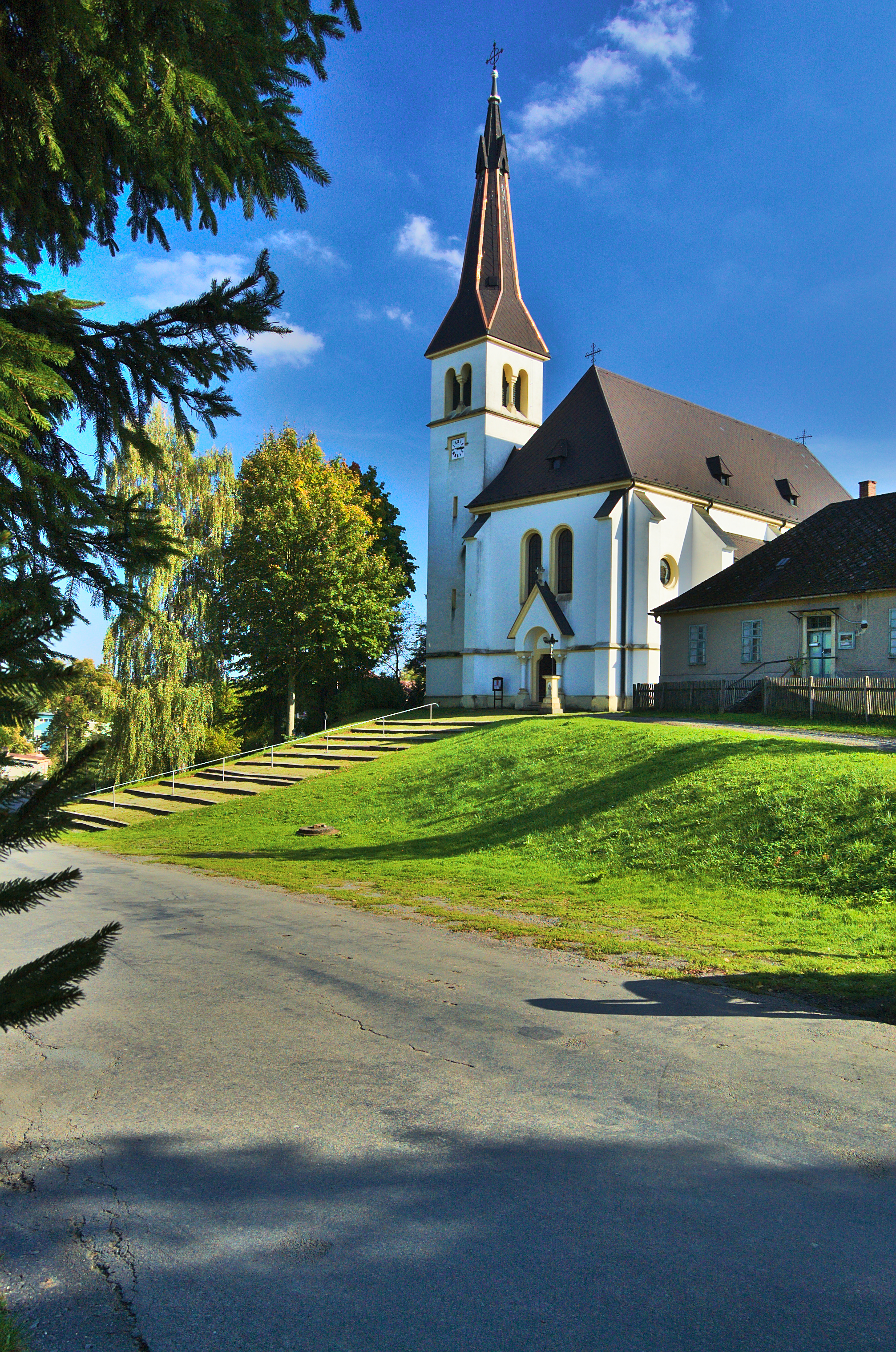 Kostel svatých Cyrila a Metoděje, Kladky, okres Prostějov